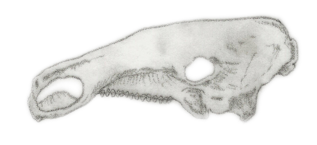 Illustration of a fossil of Silvisaurus